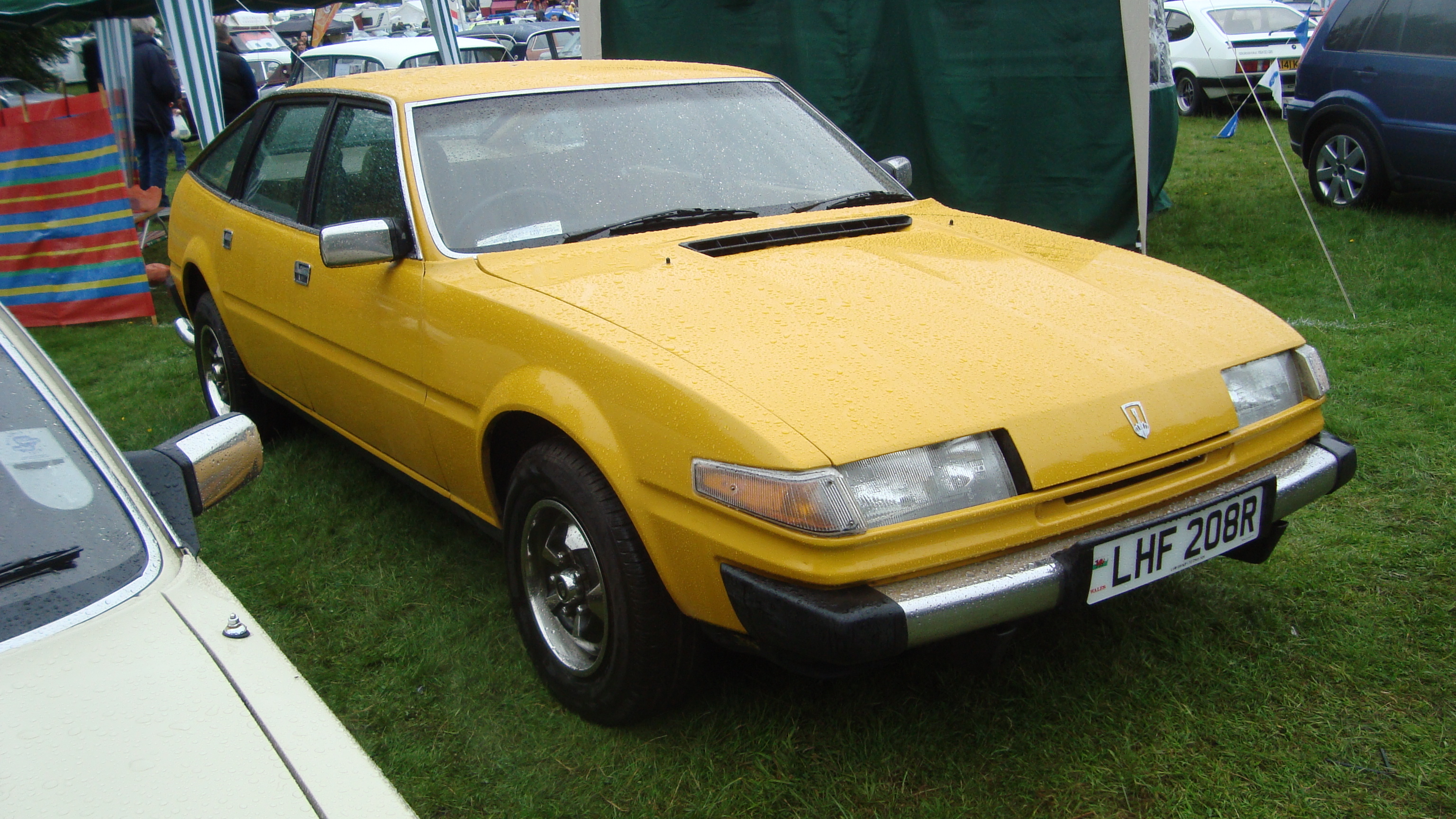 1976 Rover 3500 SD